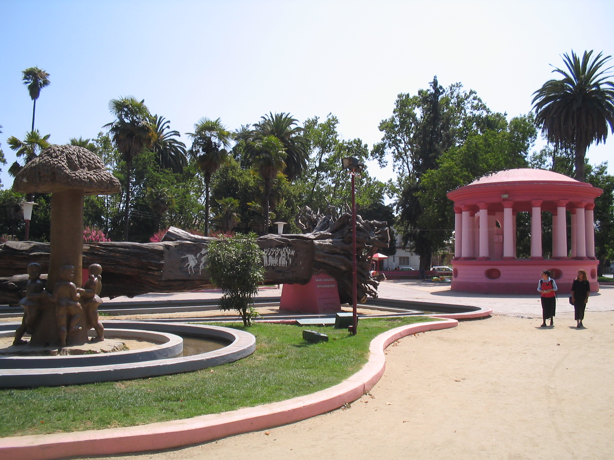 Plaza de Armas de Quillota antes de la remodelación de 2008